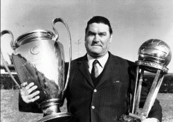 Nereo Rocco, calciatore ed allenatore italiano, ritratto mentre tiene in mano la Coppa dei Campioni e la Coppa Intercontinentale